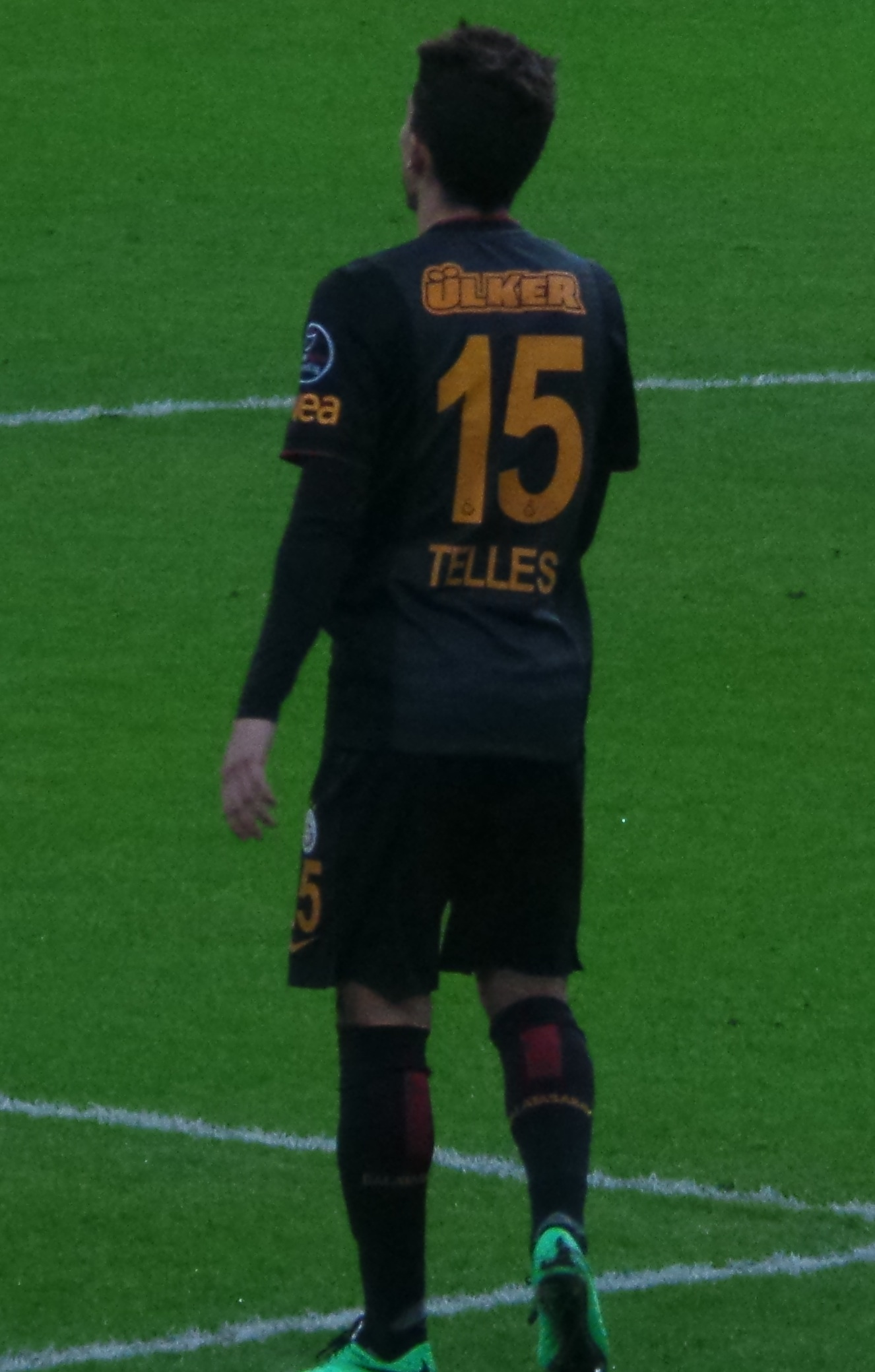 Alex Telles Galatasaray'da 15 numaralı formayı tercih etmiştir.